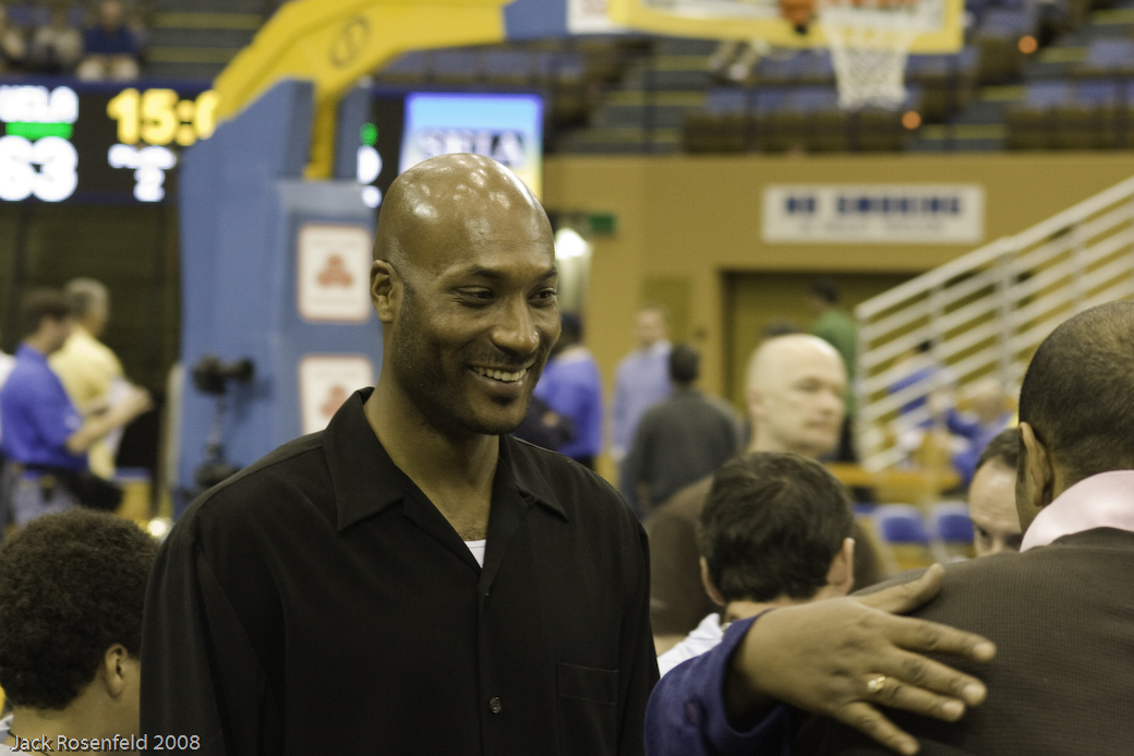 Ed O'Bannon